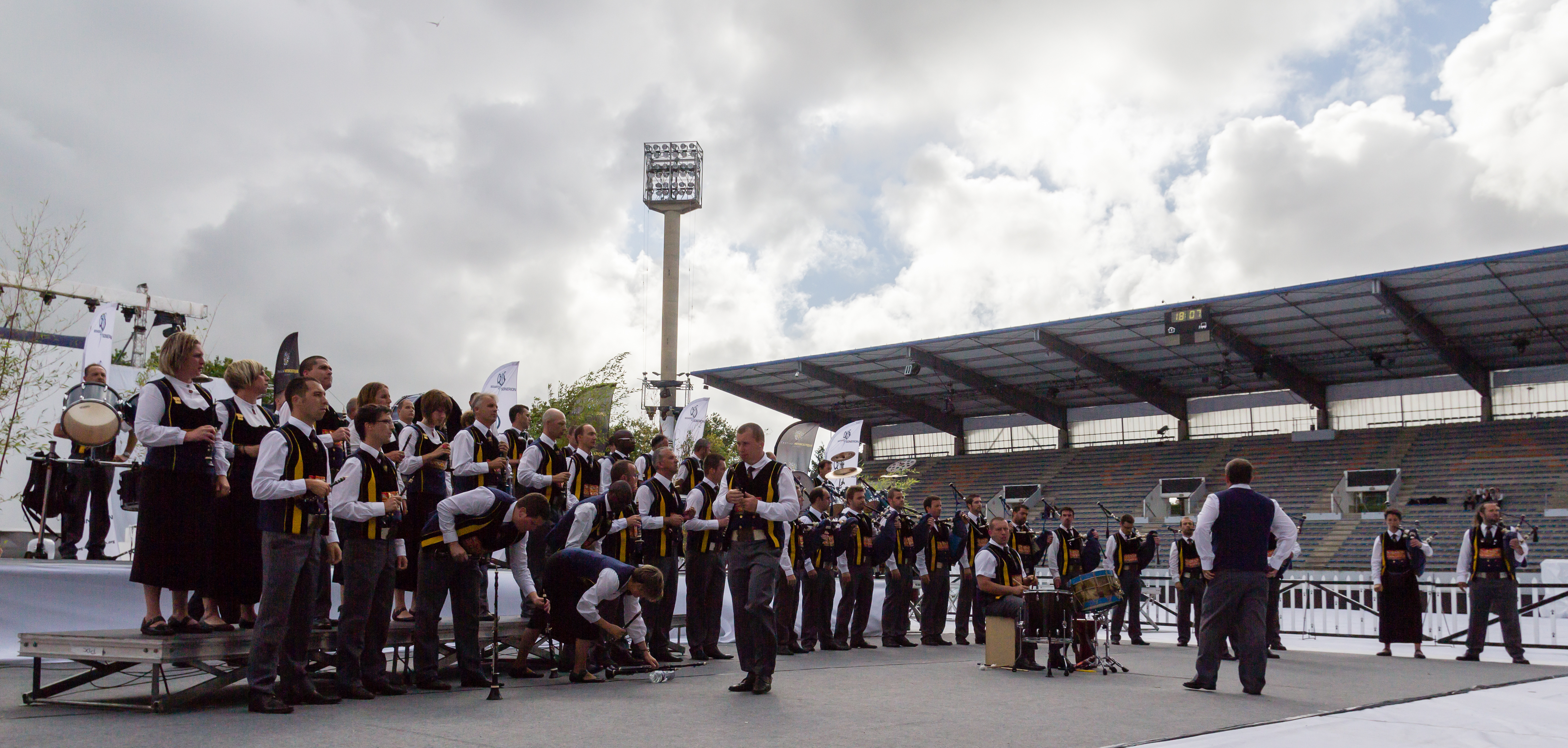 Le bagad Kemper lors du championnat national des bagadoù (première catégorie) au FIL 2012.